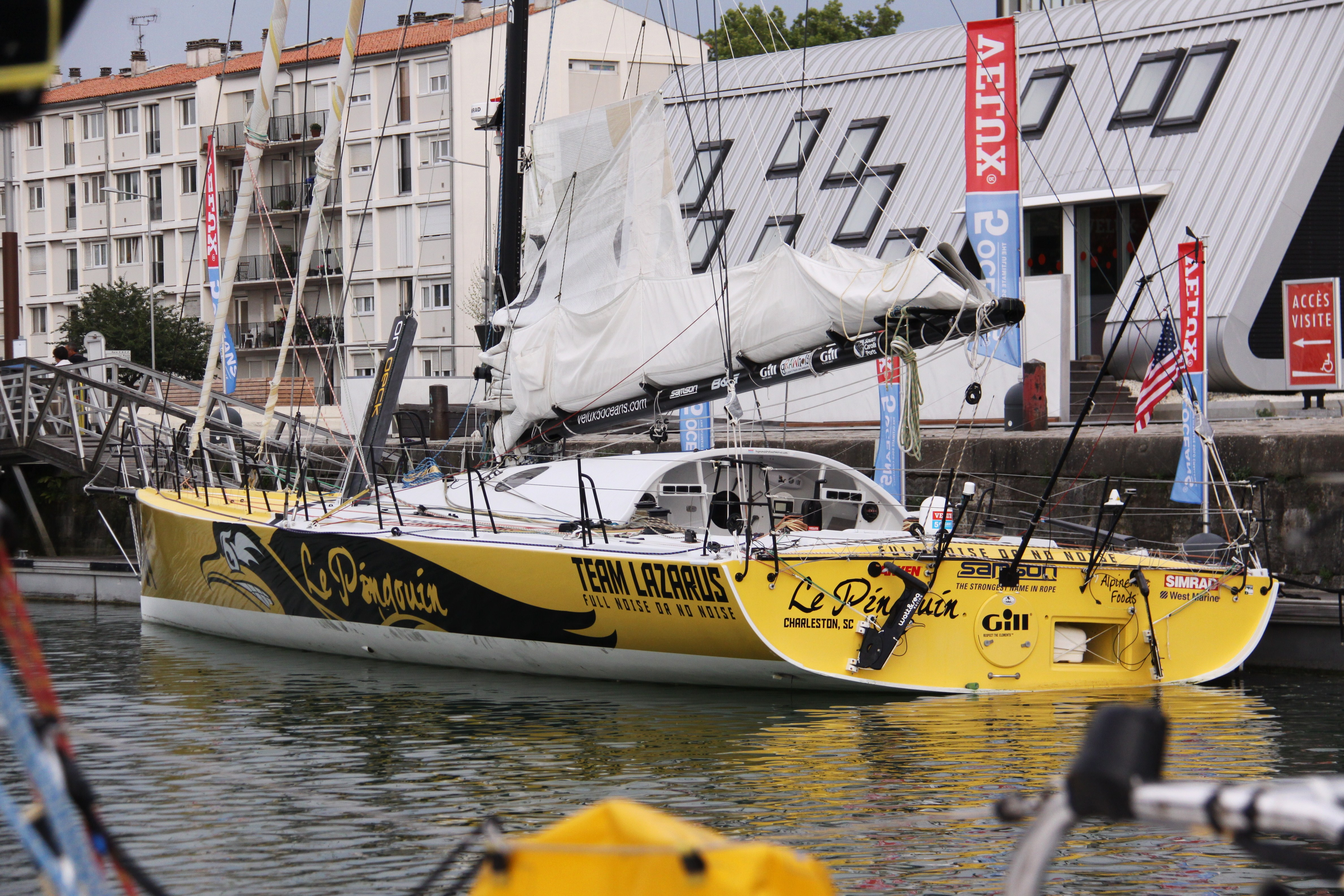 Le voilier de course "Le Pingouin" dans le Bassin des Chalutiers à La Rochelle après avoir terminé la course autour du monde en monocoque et en solitaire Velux 5 Oceans 2010-2011 (La Rochelle - La Rochelle). "Le Pingouin" est un des premiers voiliers de course Open 60 de troisième génération à voir été mis aux normes de la classe Eco 60 créée pour la Velux 5 Oceans 2010 -2011. "Le Pingouin" a été construit en 1998. Il mesure 60 pieds (18, 28 mètres) de long et 5,56 mètres de large. La Rochelle, Charente Maritime, France.